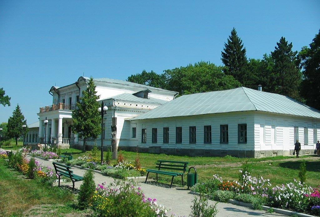 Galitzine Palace in Trostyanets